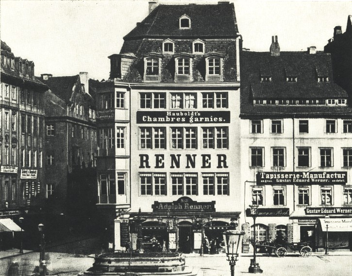 Dresdner Altmarkt 1885 vor dem Durchbruch der König-Johann-Straße, im Vordergrund der 1888 abgetragene Justitia-Brunnen